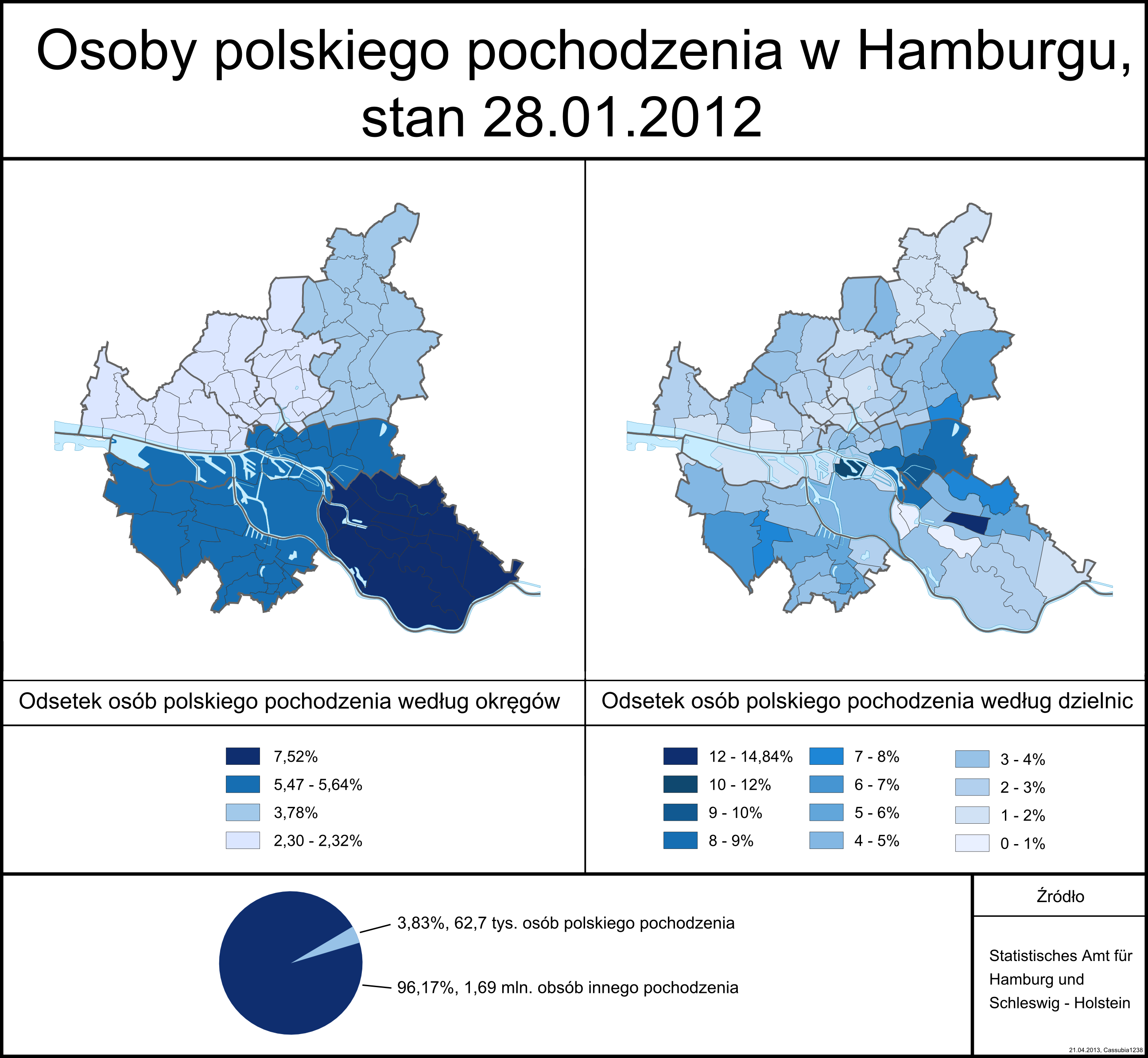 Bevölkerung mit polnischem Migrationshintergrund in Hamburg